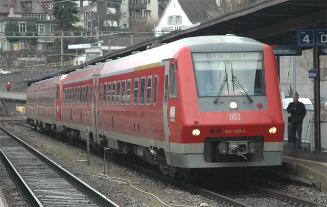 DB treinstel 611 510 van het type 611 te Schaffhausen